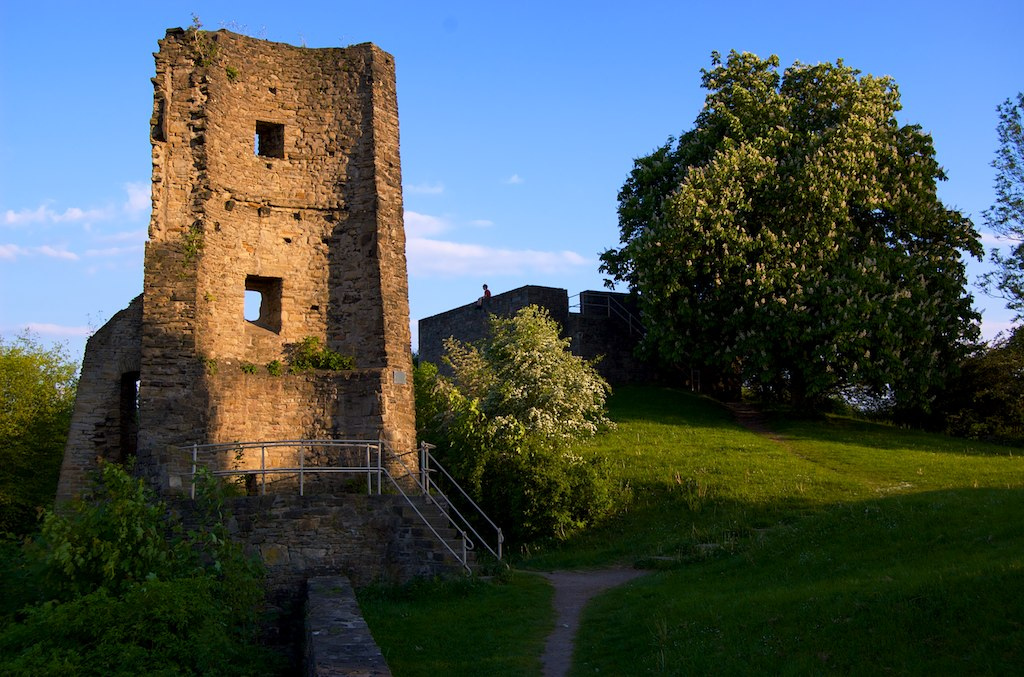 Burgruine Volmarstein 2010